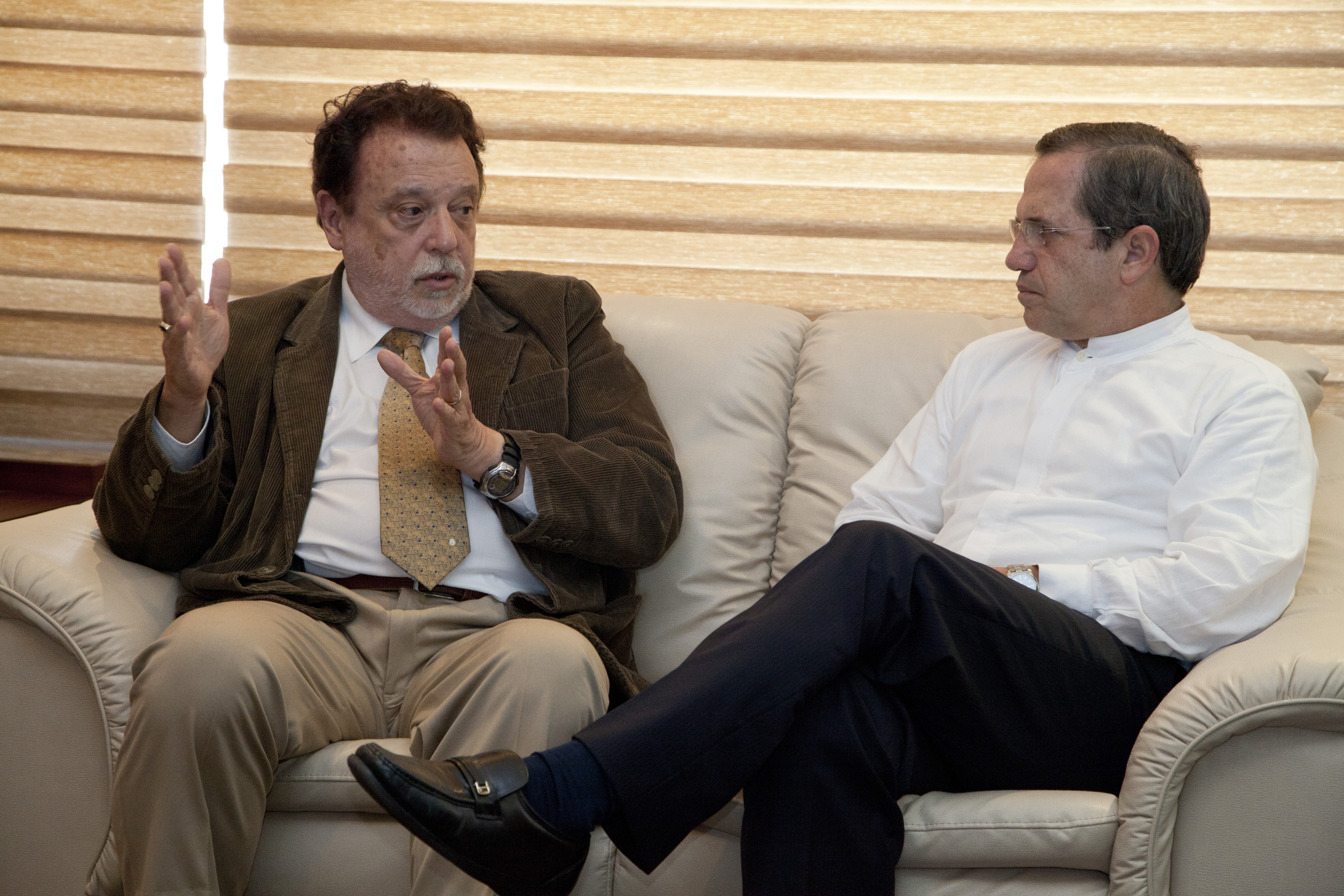 Quito (Ecuador), 30 de Mayo 2012. El Canciller Ricardo Patiño se reunión esta mañana en su despacho con el científico social y escritor Theotonio dos Santos. Foto: Fernanda LeMarie - Ministerio de Relaciones Exteriores, Comercio e Integración.